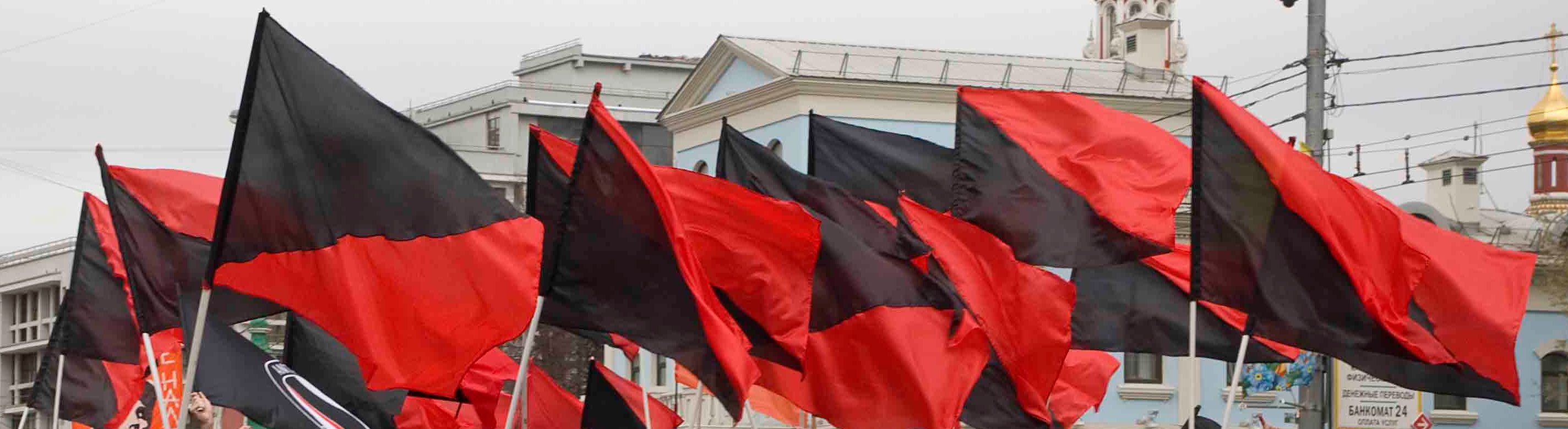 Москва. Митинг анархистов